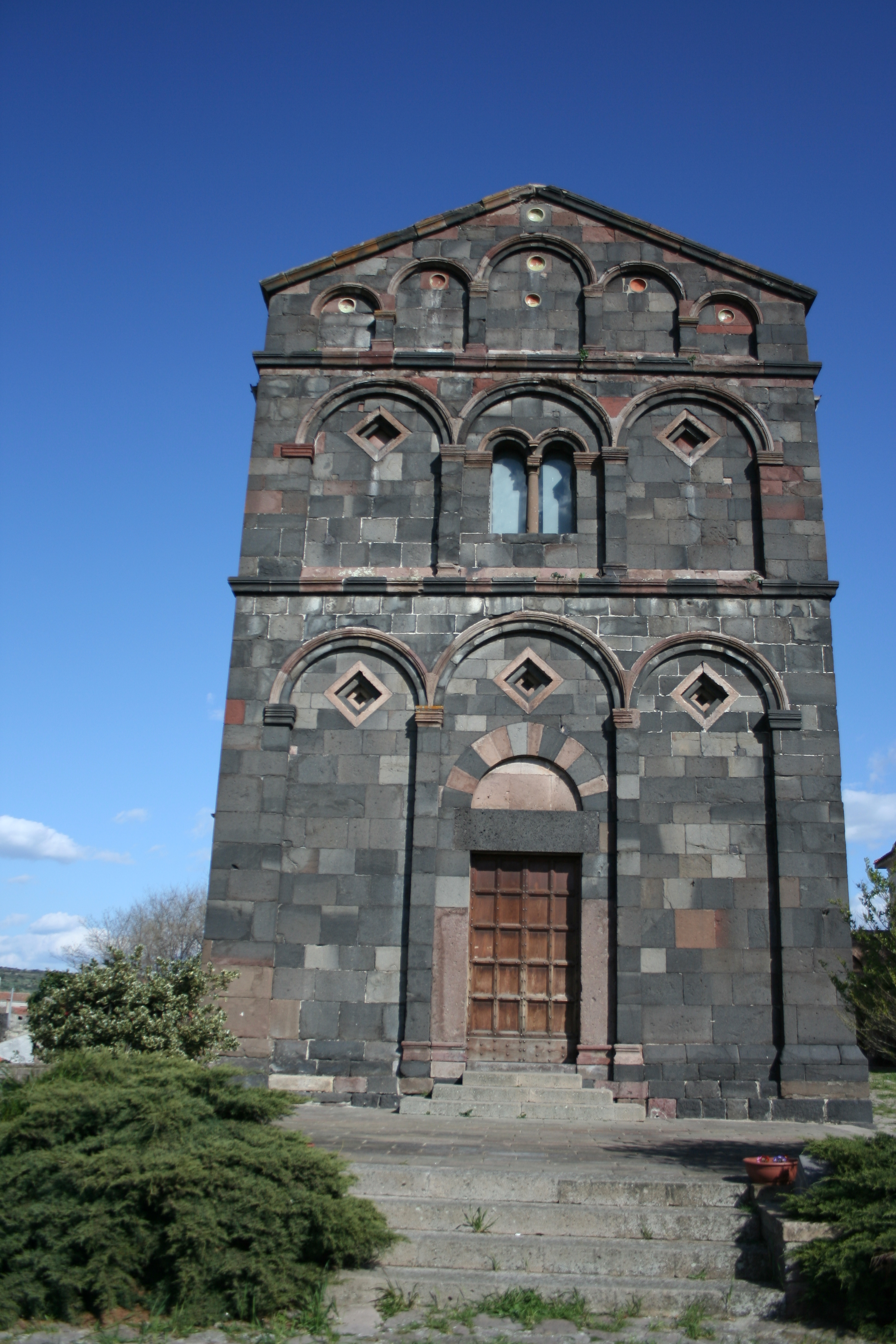 Chiesa di san Nicola di Ottana (Nu). Facciata